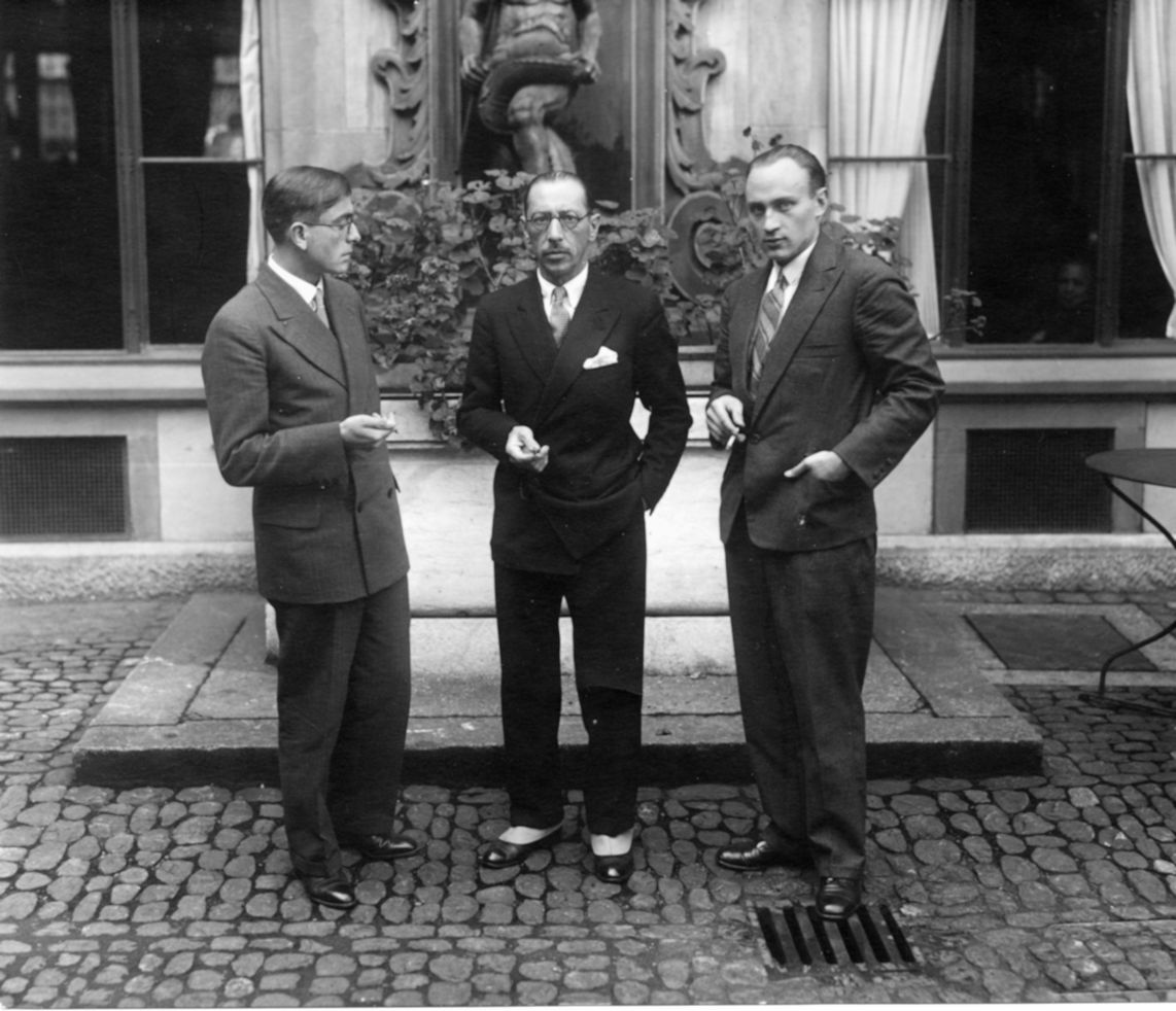 Conrad Beck, Igor Stravinsky und Paul Sacher in Basel am 2. Oktober 1930 anlässlich der Aufführung von - Beck, Sinfonie n. 5 - Stravinskij, Rag Time - Stravinskij, Capriccio - Stravinskij, Apollon Musagète